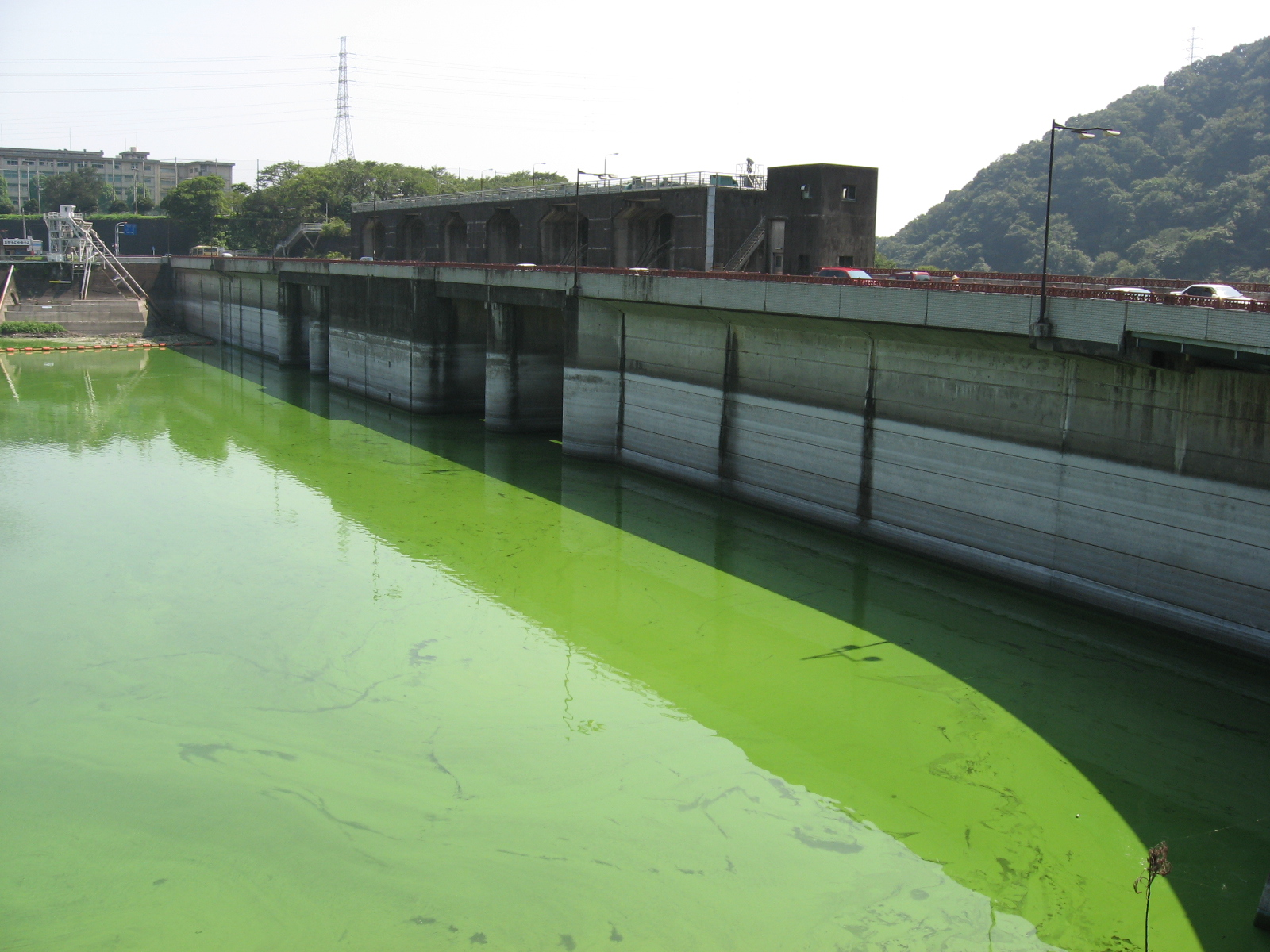 アオコが大発生して、湖水が黄緑色に染まった津久井湖